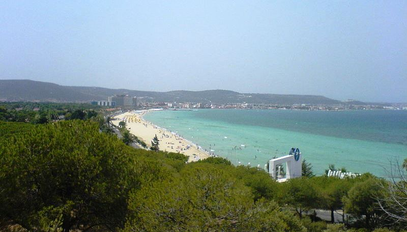 Strand in Cesme